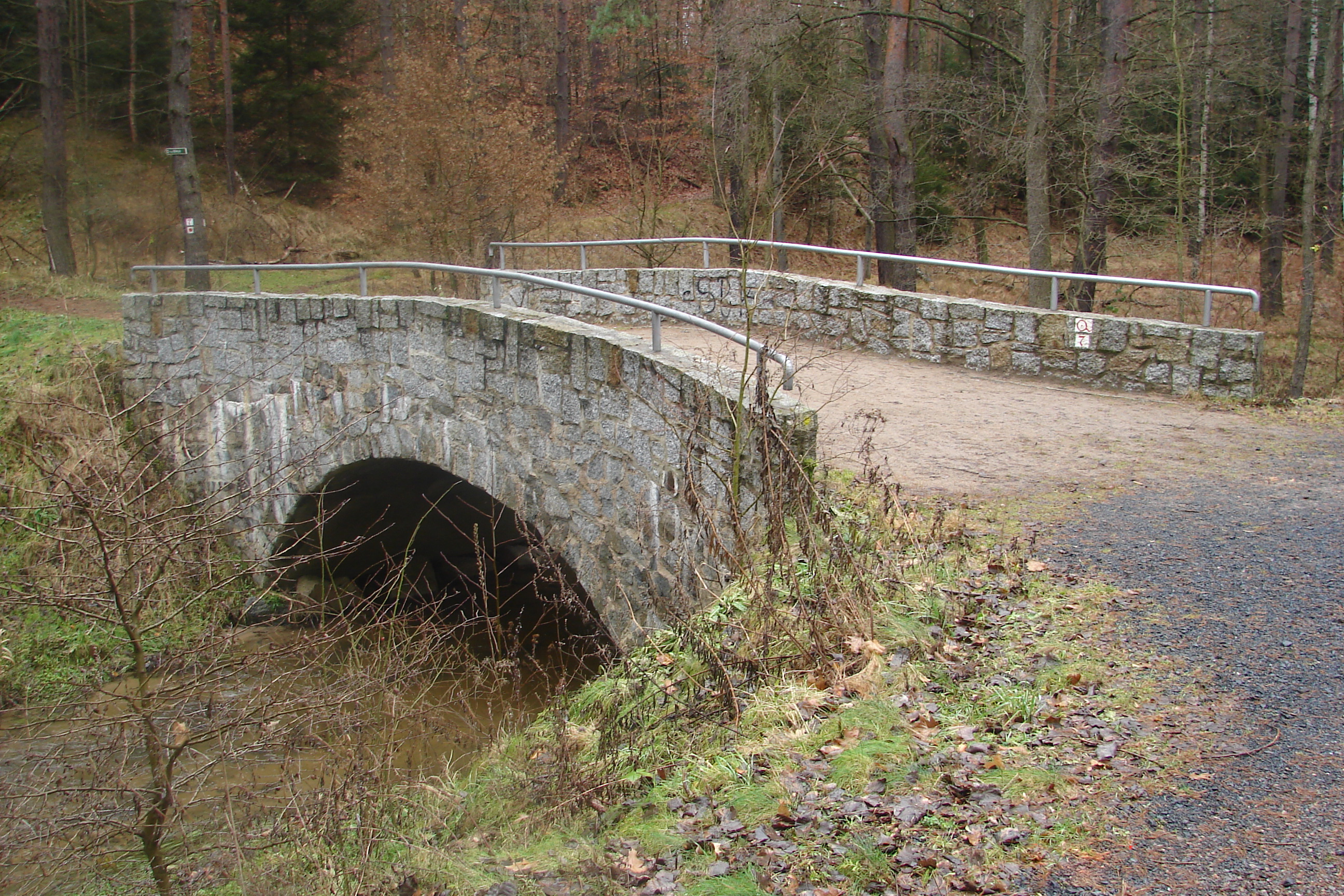 Brücke von Kuhschwanz und Alter Sieben über die Prießnitz, nordwestlich der Heidemühle, Dresdner Heide